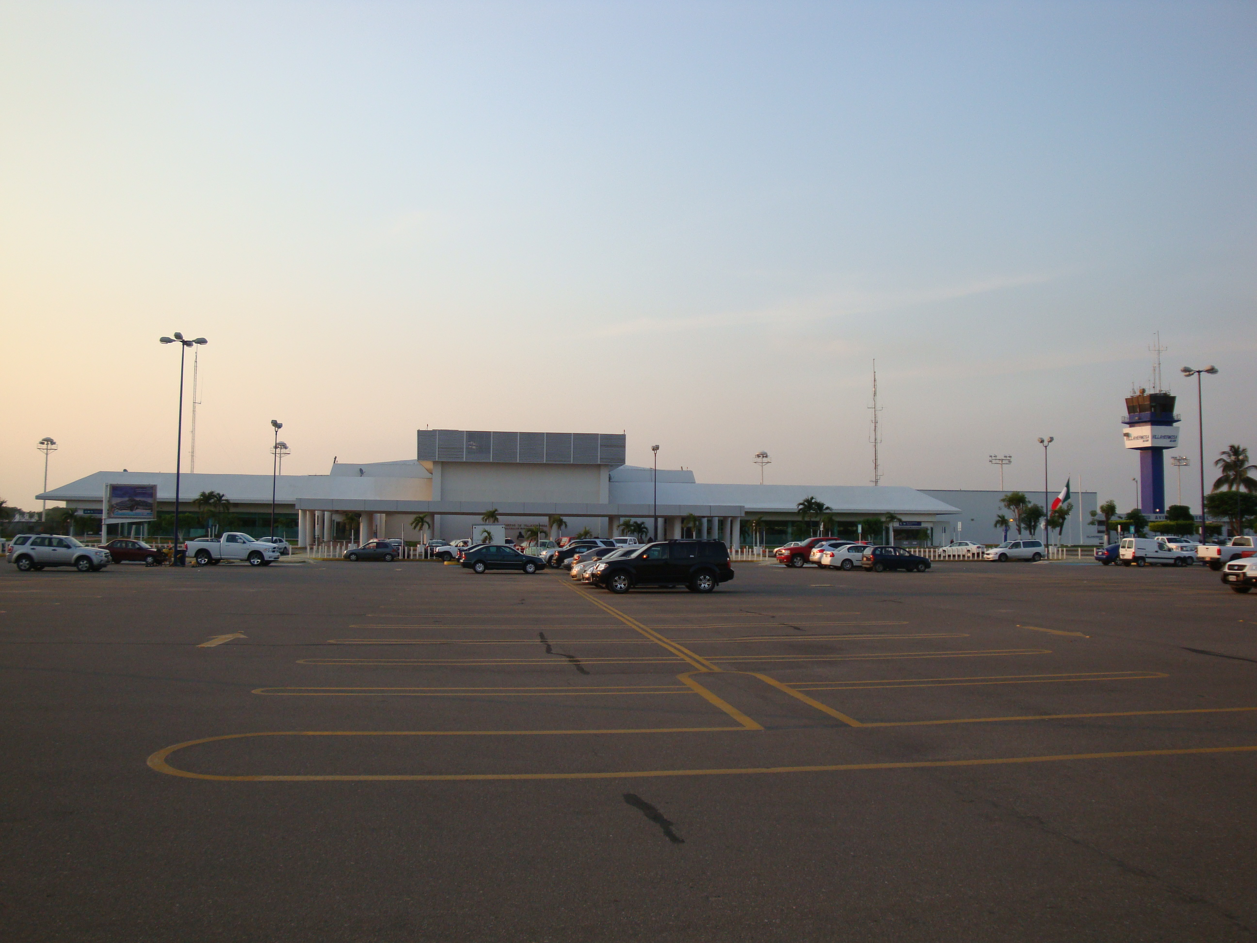 Fachada del Aeropuerto Internacional de Villahermosa, Tabasco, México.